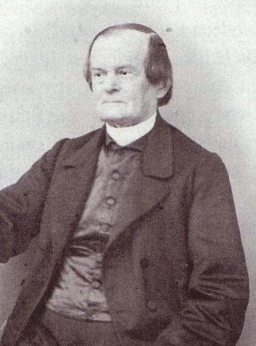 Constantin Ackermann, Theologe und Ehrenbürger von Meiningen